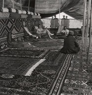 ناصر خان قشقایی در آلاچیق